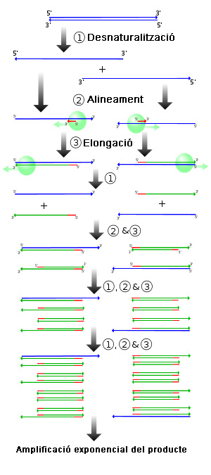 procés de la PCR